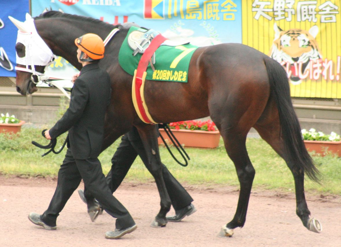 ボンネビルレコード（2008年5月5日 船橋競馬場）